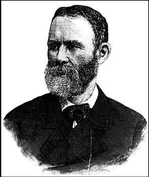 Шустов, Николай Леонтьевич